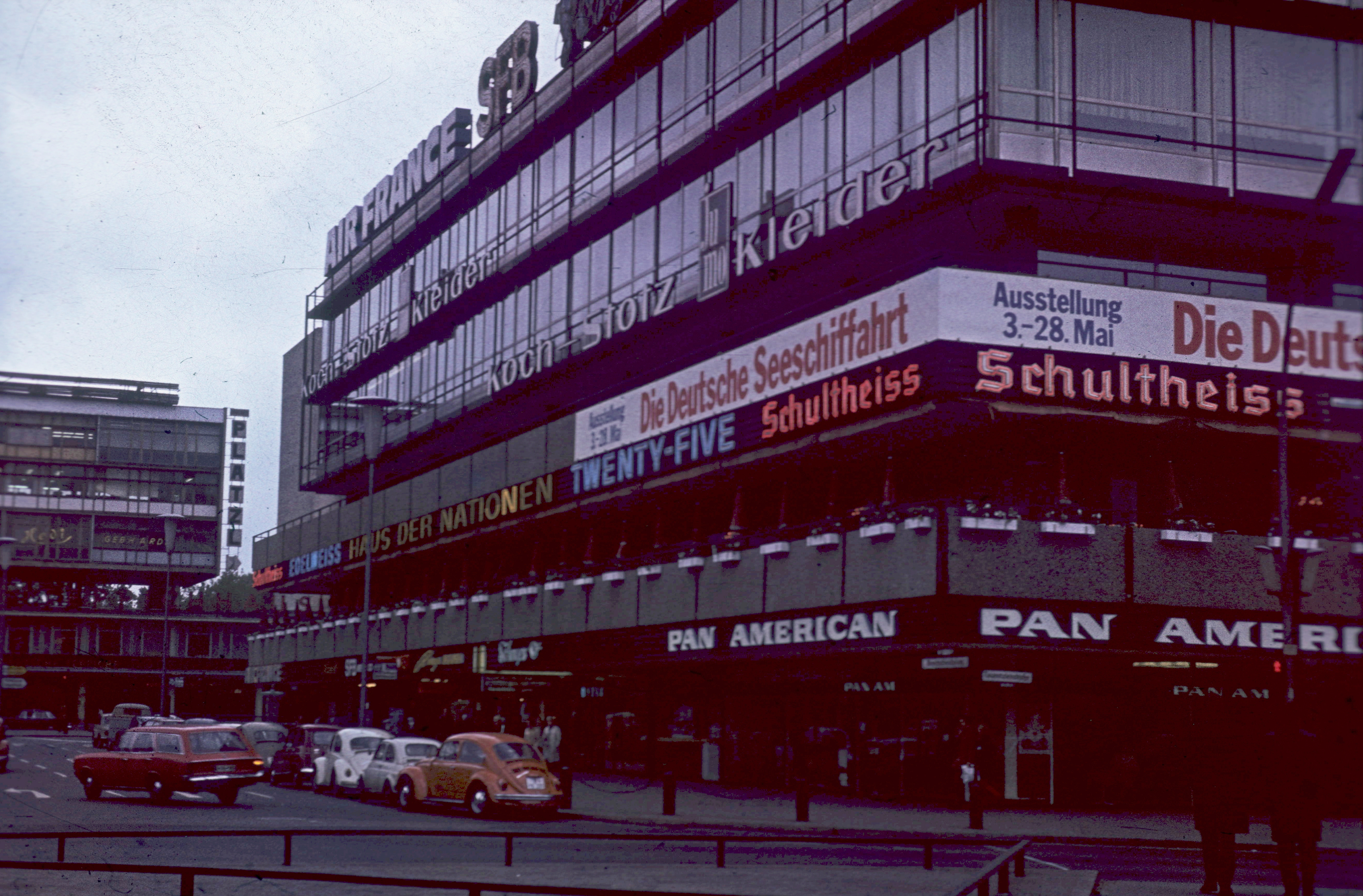 Europa Center. Location: Germany, Berlin Tags: colorful, street view, Volkswagen-brand, sign-board, ad, West Berlin, automobile, Volkswagen Beetle Title: Europa Center.